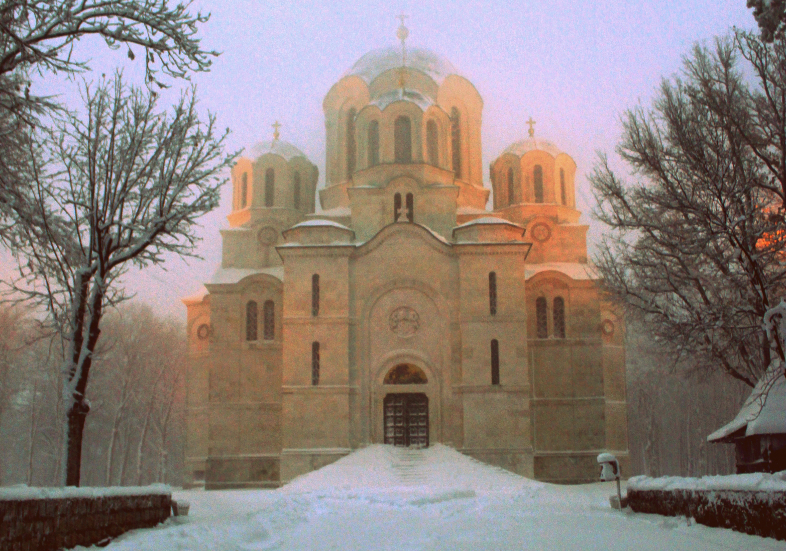 Zima na Oplencu, Topola